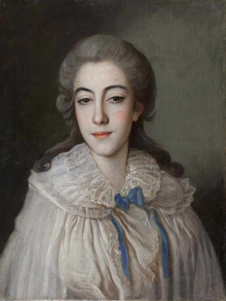 Портрет Е. И. Голенищевой-Кутузовой, урожденной Бибиковой. Конец 1770-х — 1780-е. Неизвестный художник. Екатерина Ильинична Голенищева-Кутузова (1754–1824), жена Портрет Е. И. Голенищевой-Кутузовой, урожденной Бибиковой. Конец 1770-х–1780-е. Неизвестный художник фельдмаршала М. И. Голенищева-Кутузова. Екатерина Ильинична, незаурядная личность, занимала видное место в свете и при дворе, имела литературный талант, страстно увлекалась театром и покровительствовала артистам. От Павла I она получила орден Св. Екатерины, Александр I после Бородинского сражения сделал ее статс-дамой. Портрет, пополнивший музейное собрание, впервые экспонировался в Императорском Российском Историческом музее имени императора Александра III в Москве на выставке, посвященной столетнему юбилею Отечественной войны 1812 года, куда был предоставлен потомками сестры фельдмаршала, Анны Ильиничны, одновременно с портретом самого М. И. Кутузова в молодости (по-видимому, парным к портрету жены). М. И. Кутузов женился на Екатерине Ильиничне Бибиковой, дочери известного военачальника генерал-полковника Ильи Александровича Бибикова, в 1778 году. Известны ее портреты, исполненные в павловское и александровское царствование. Приобретенный Историческим музеем — самый ранний портрет — очень вероятно, был написан в связи со свадьбой Михаила Илларионовича и Екатерины Ильиничны.